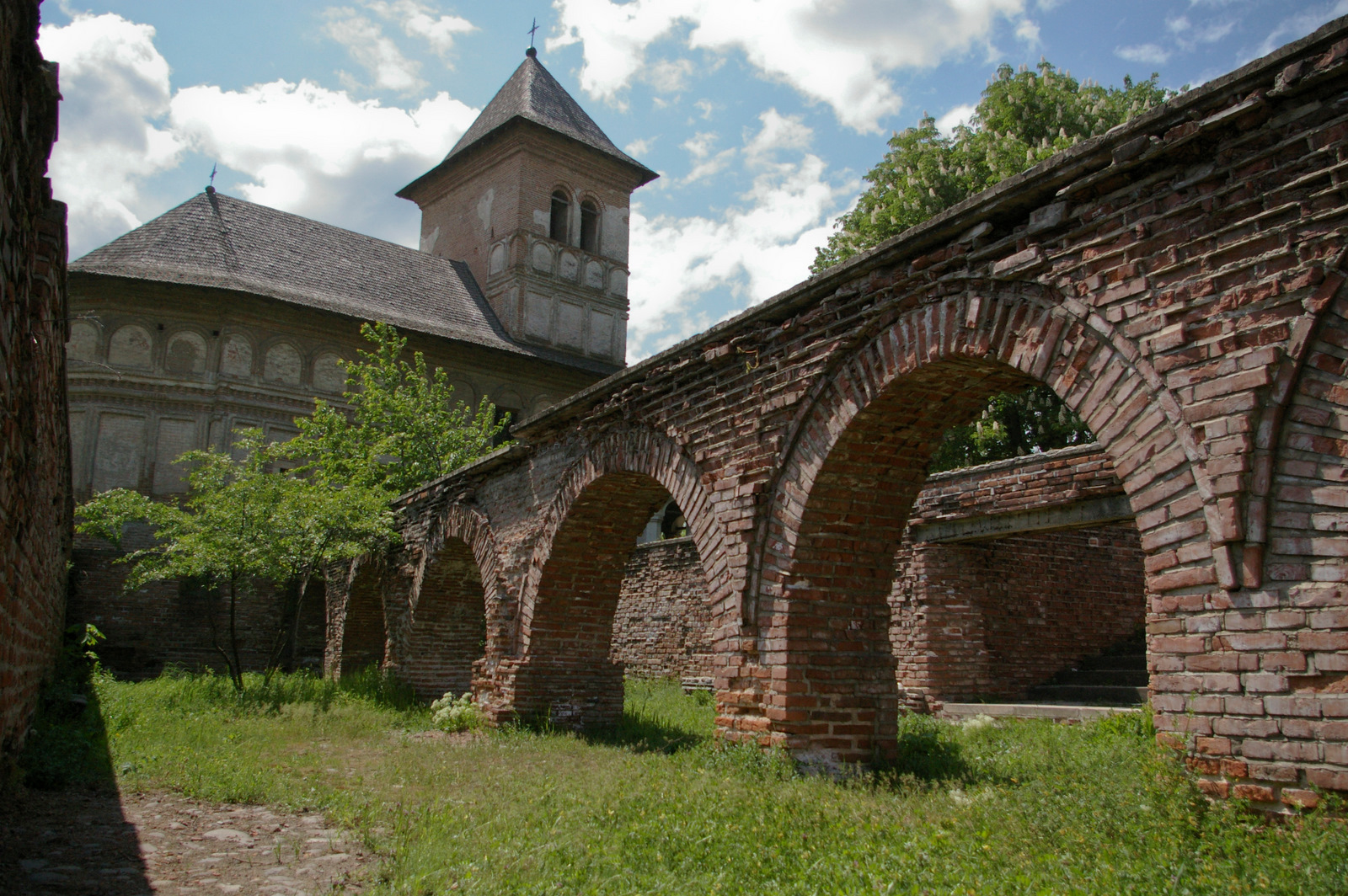 Fotografia prezinta Beciurile palatului domnesc din cadrul manastirii Strehaia (in fundal se observa si Biserica "Sf. Treime" - cod LMI: MH-II-m-A-10406.01)